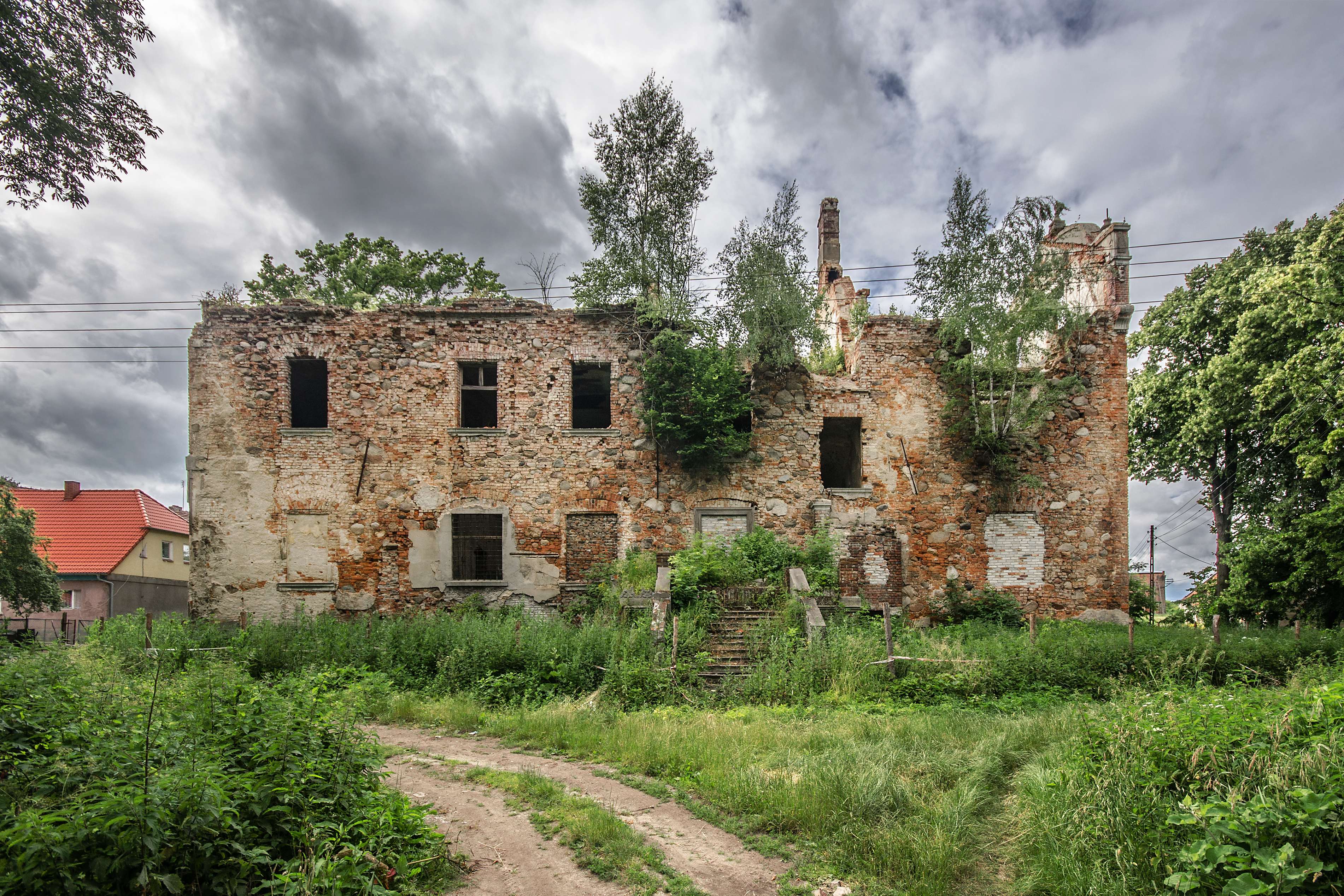 Glinica, pałac, 1680